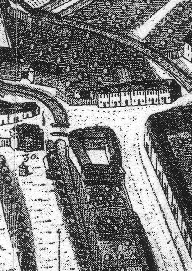 Gotha, Zum Mohren